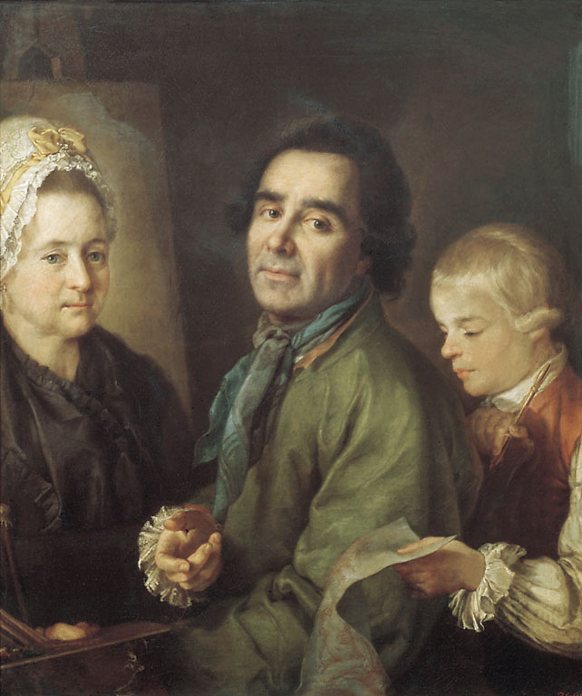 Дрождин Петр Семенович . Портрет А.П. Антропова с сыном перед портретом жены Елены Васильевны / Русский музей